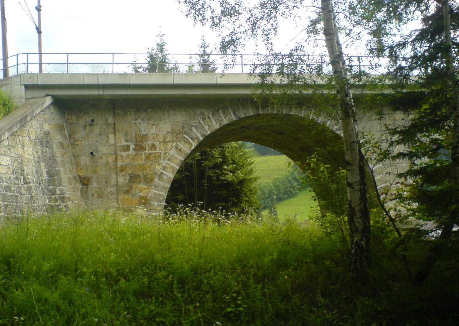 Steinhaus Viadukt. Oben fährt die Semmeringbahn unten fuhr die Feistritzwaldbahn durch.